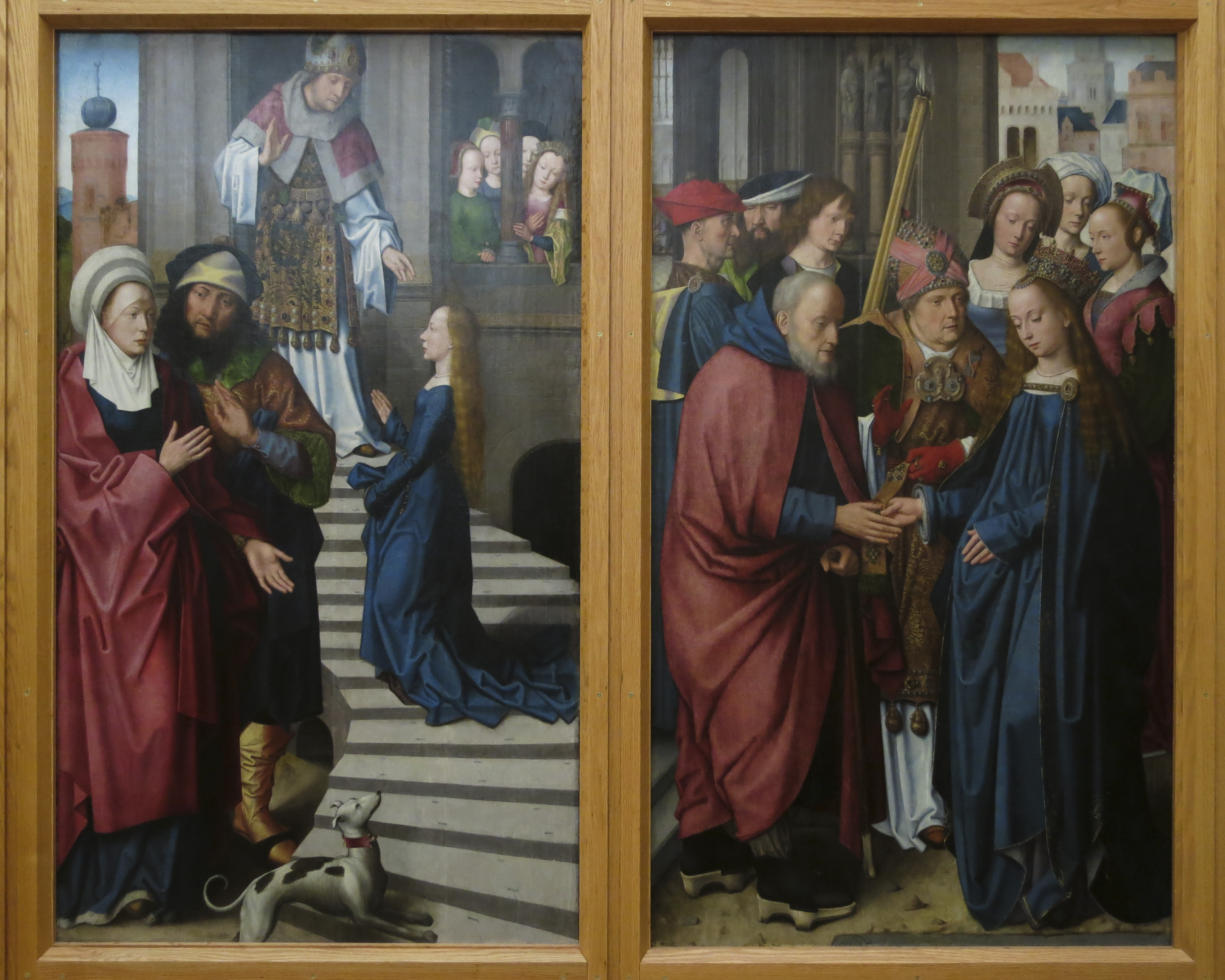 Políptico Presentation of Virgin Mary Marriage of the Virgin